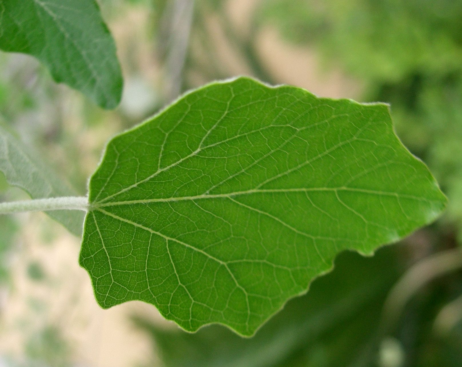 Populus alba